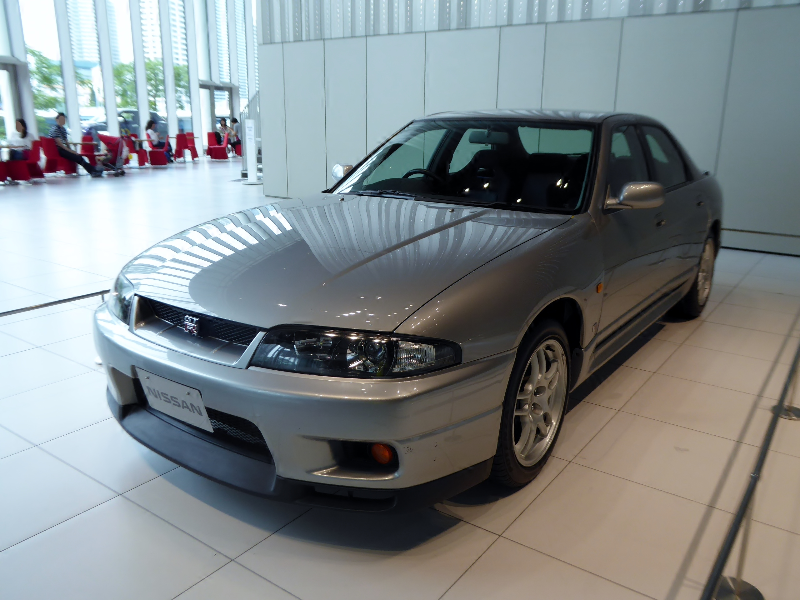 1998年式日産・スカイラインGT-R 4ドアオーテックバージョン40thアニバーサリーを撮影。